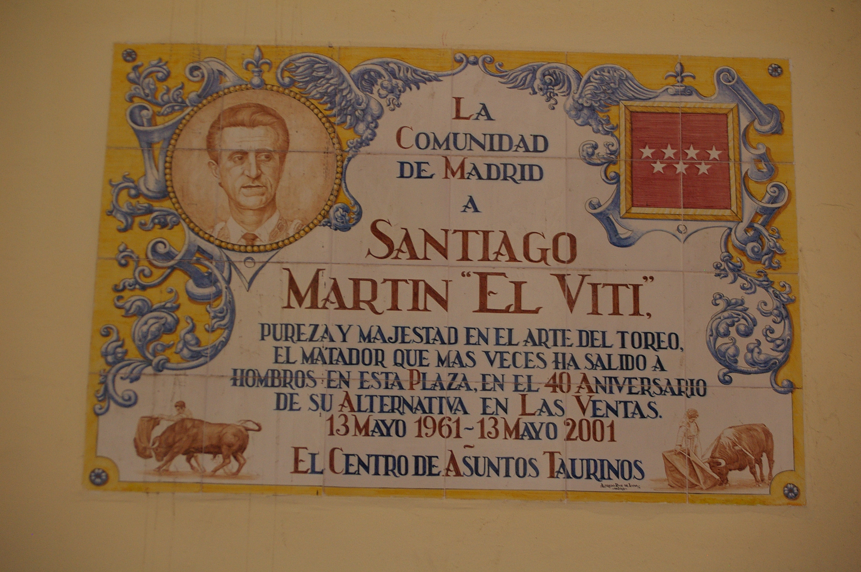 Placa de homenaje a El Viti en Las Ventas (Madrid).